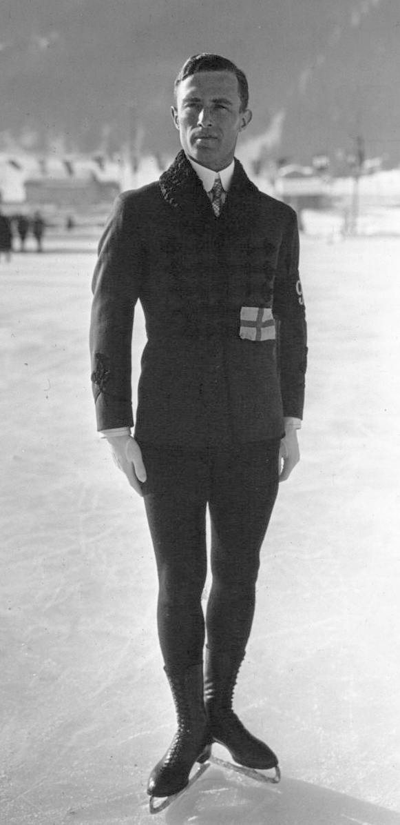 Grafstrom, champion du monde de patinage : [photographie de presse] / Agence Meurisse